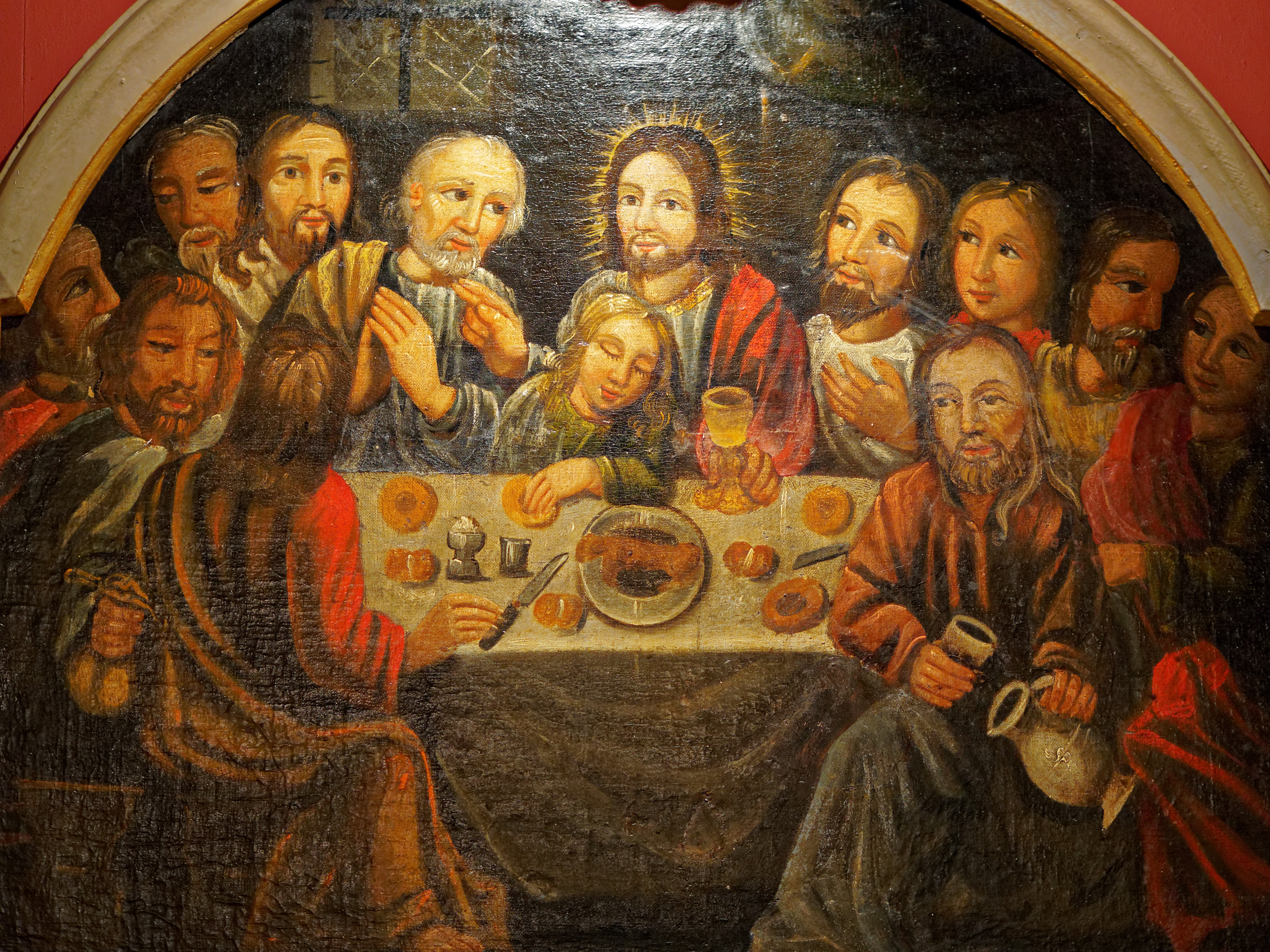 Inneres der Servatiuskirche in Kierspe: Altarbild Abendmahl mit Jüngerinnen, fotografiert anlässlich des Wikipediastammtisches Sauerland in Kierspe